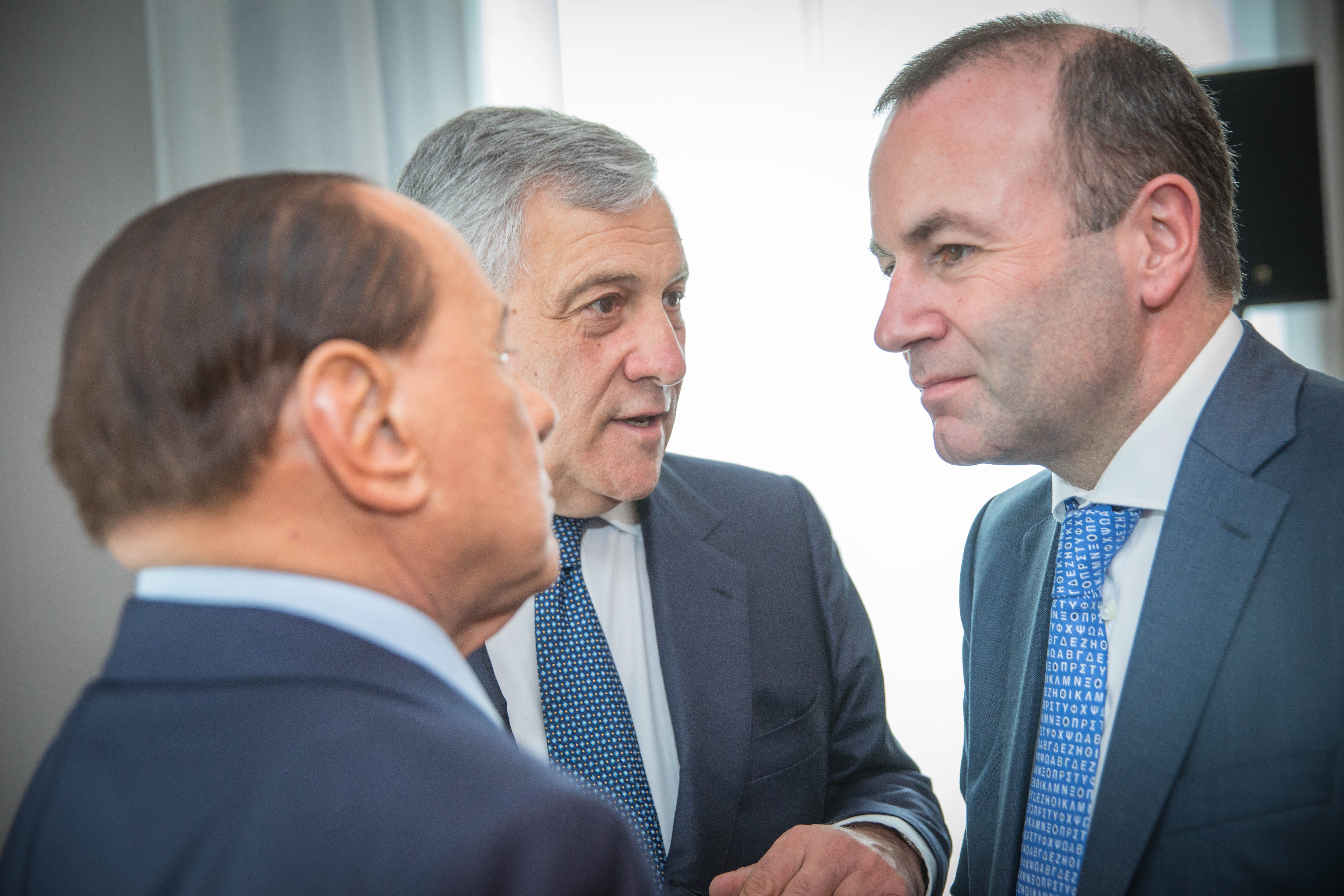 EPP Summit, Brussels, May 2019